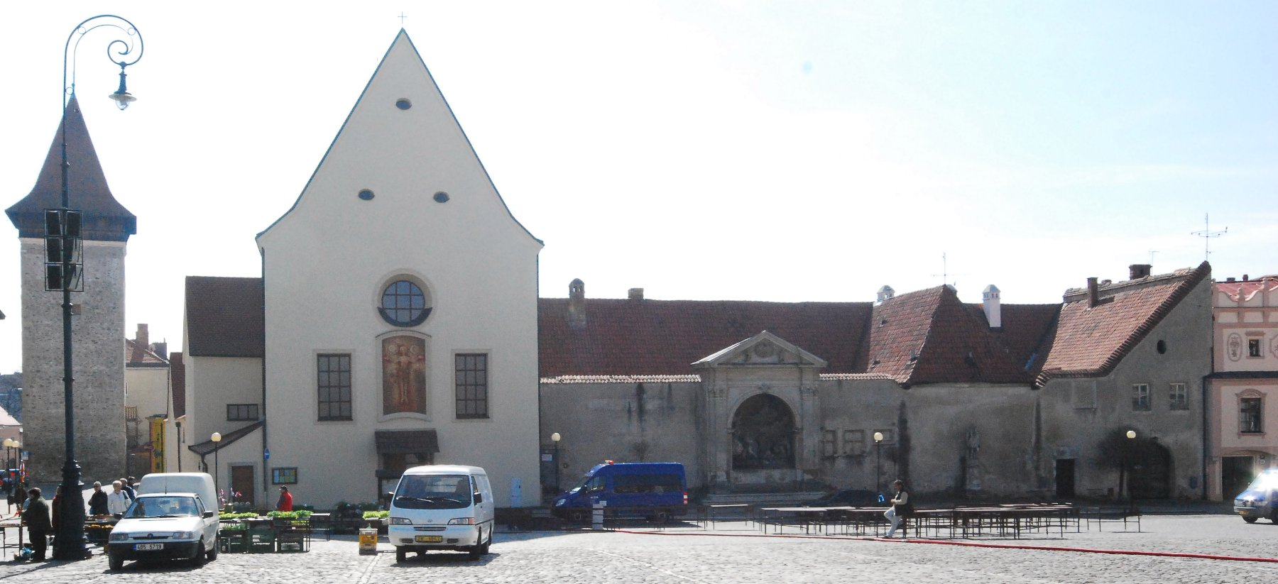 Das ehemalige Kapuzinerkloster am südlichen Ende des Unteren Platzes in Znaim an der Thaya.